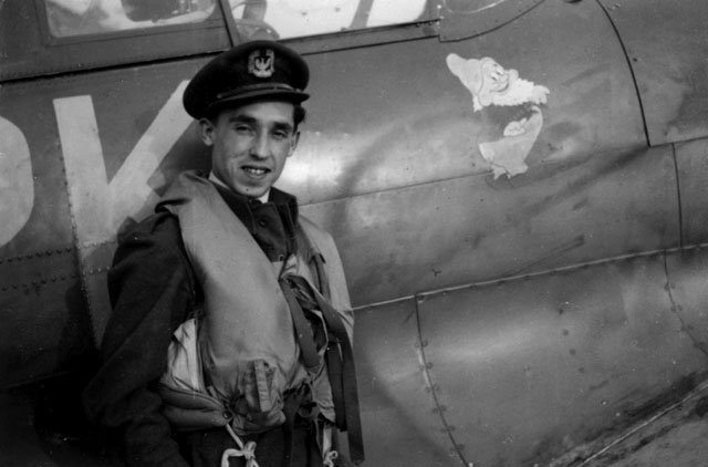 šaltinis